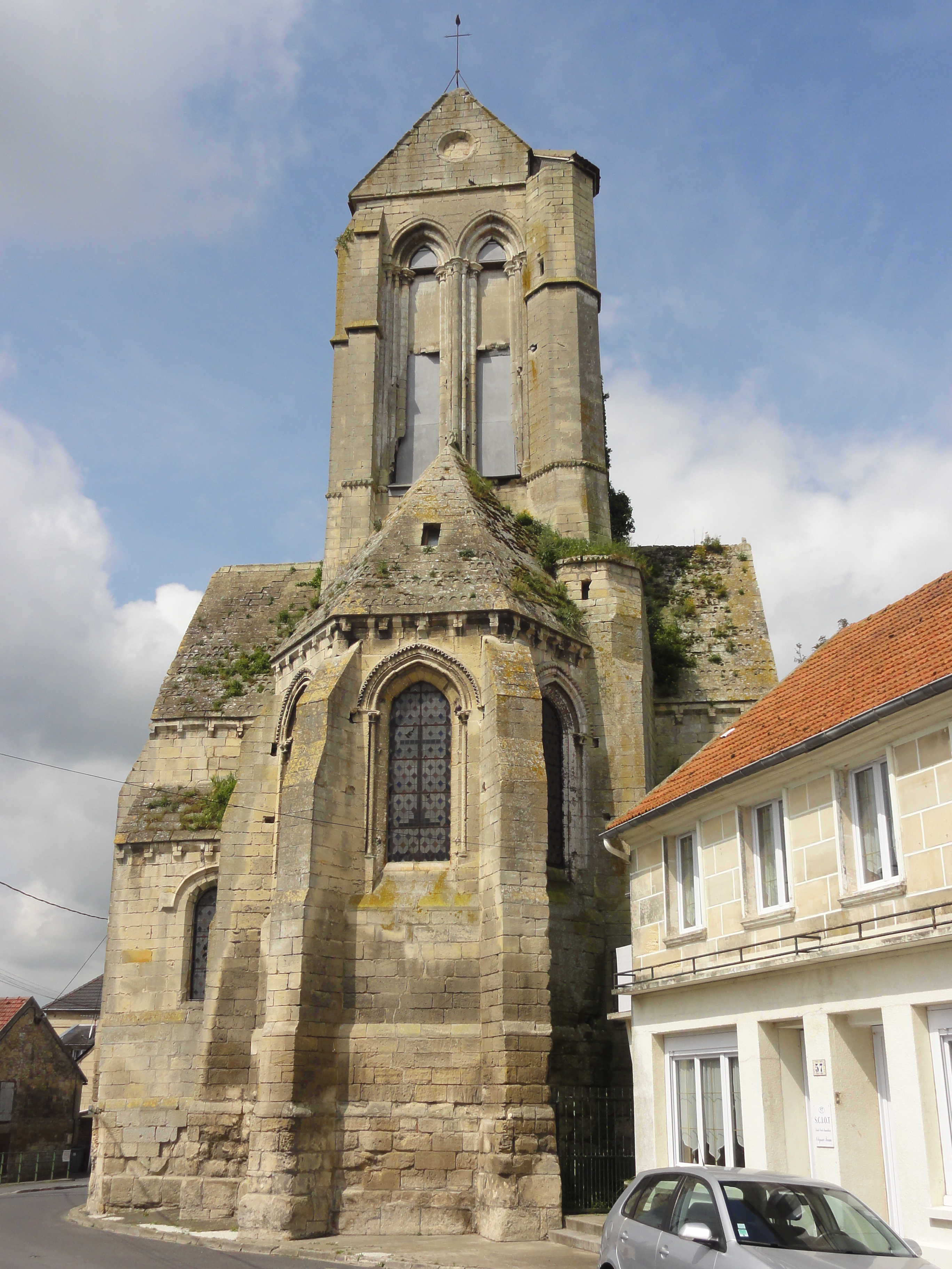 L'église Saint-Vaast, vue depuis l'est.